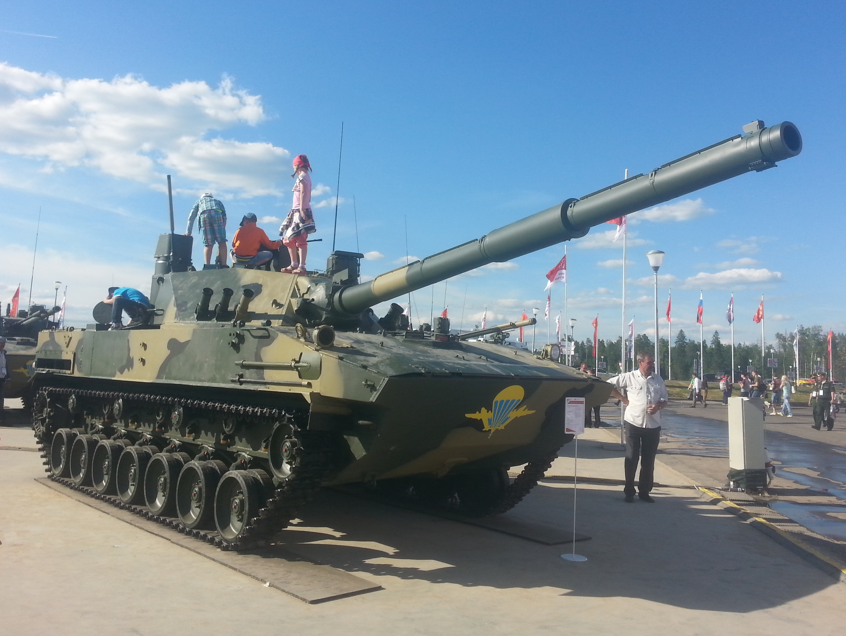 2С25 Спрут-СДМ-1 на выставке Армия 2015 в Кубинке